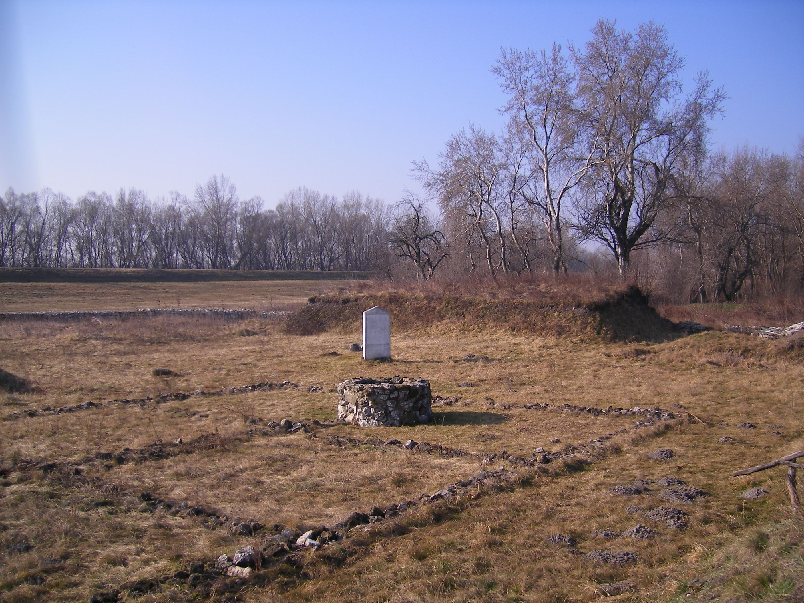 Izsa - Celemantia római tábor helye